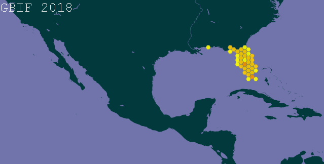 Występowanie Jordanella floridae